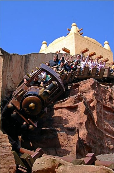 Mienenachterbahn von Vekoma im Phantasialand, Deutschland – mine train by Vekoma at Phantasialand (Germany)